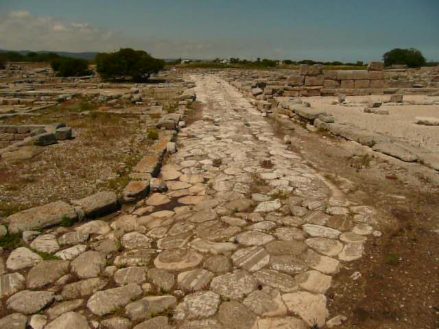 Parque arqueológico de Egnazia, Apulia.